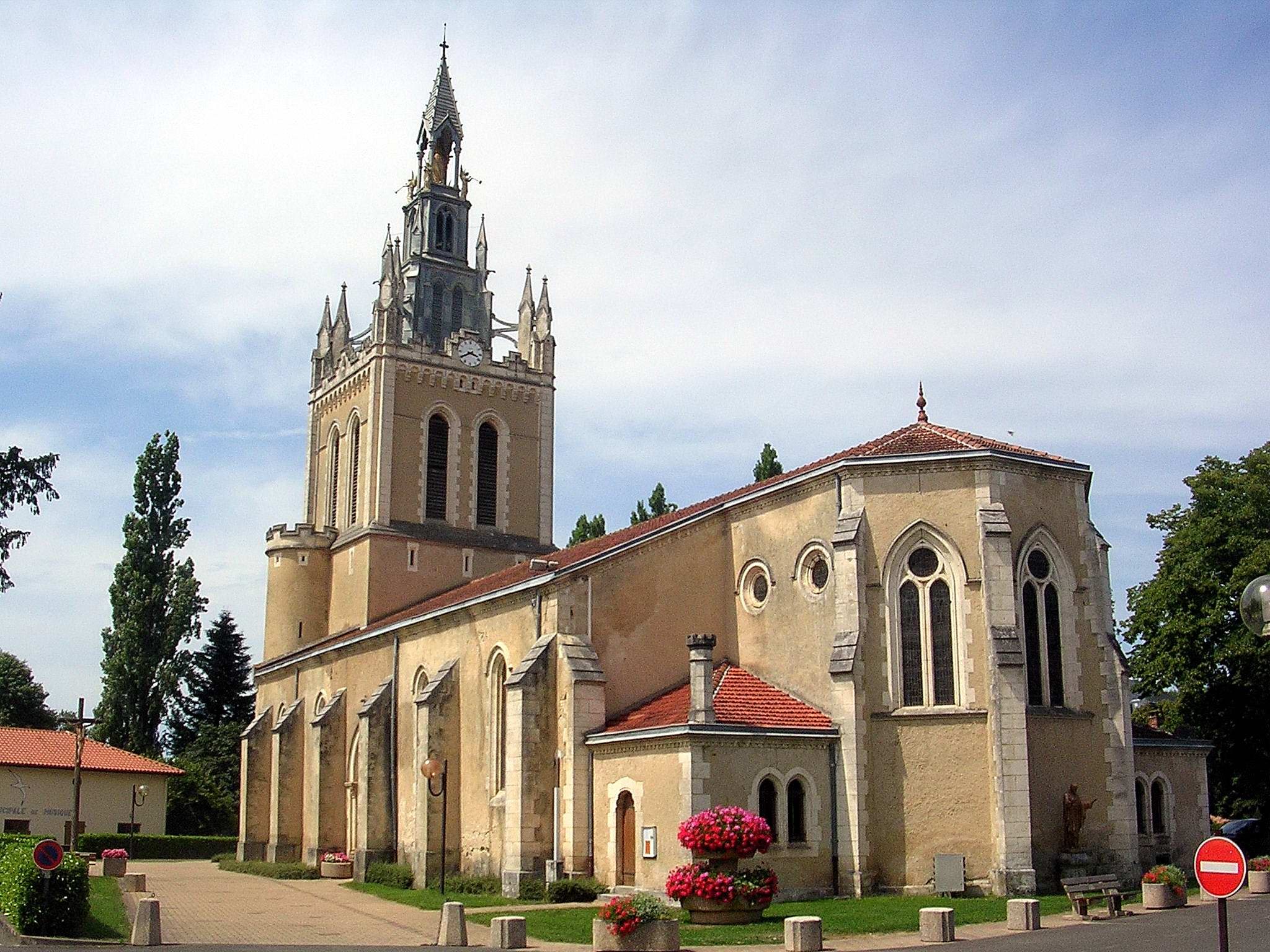 Église Notre-Dame de Lit, à Lit-et-Mixe, dans le département français des Landes